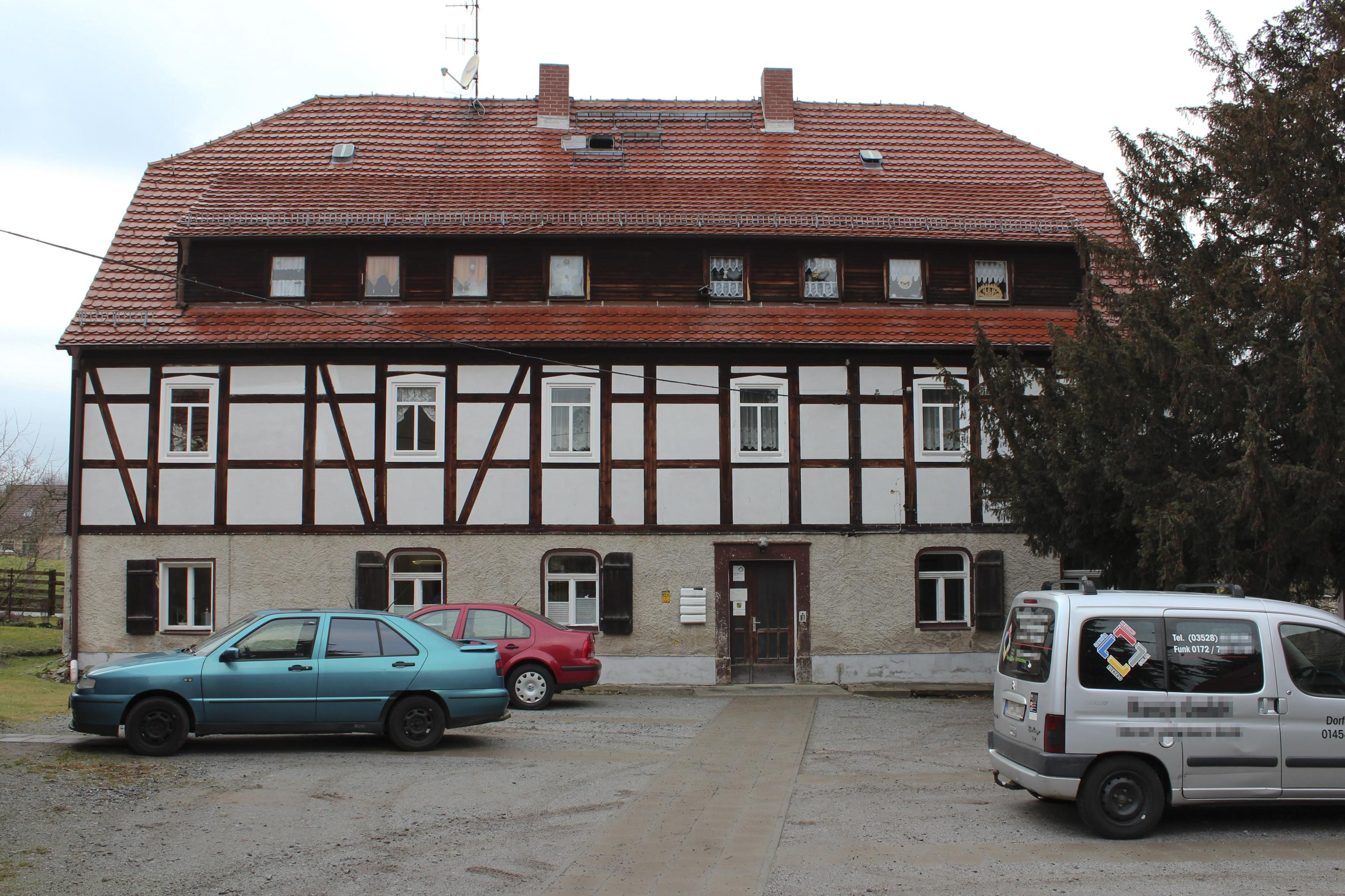 Ortsamt und Forstamt in Ullersdorf (Radeberg), Ullersdorfer Hauptstraße 20.